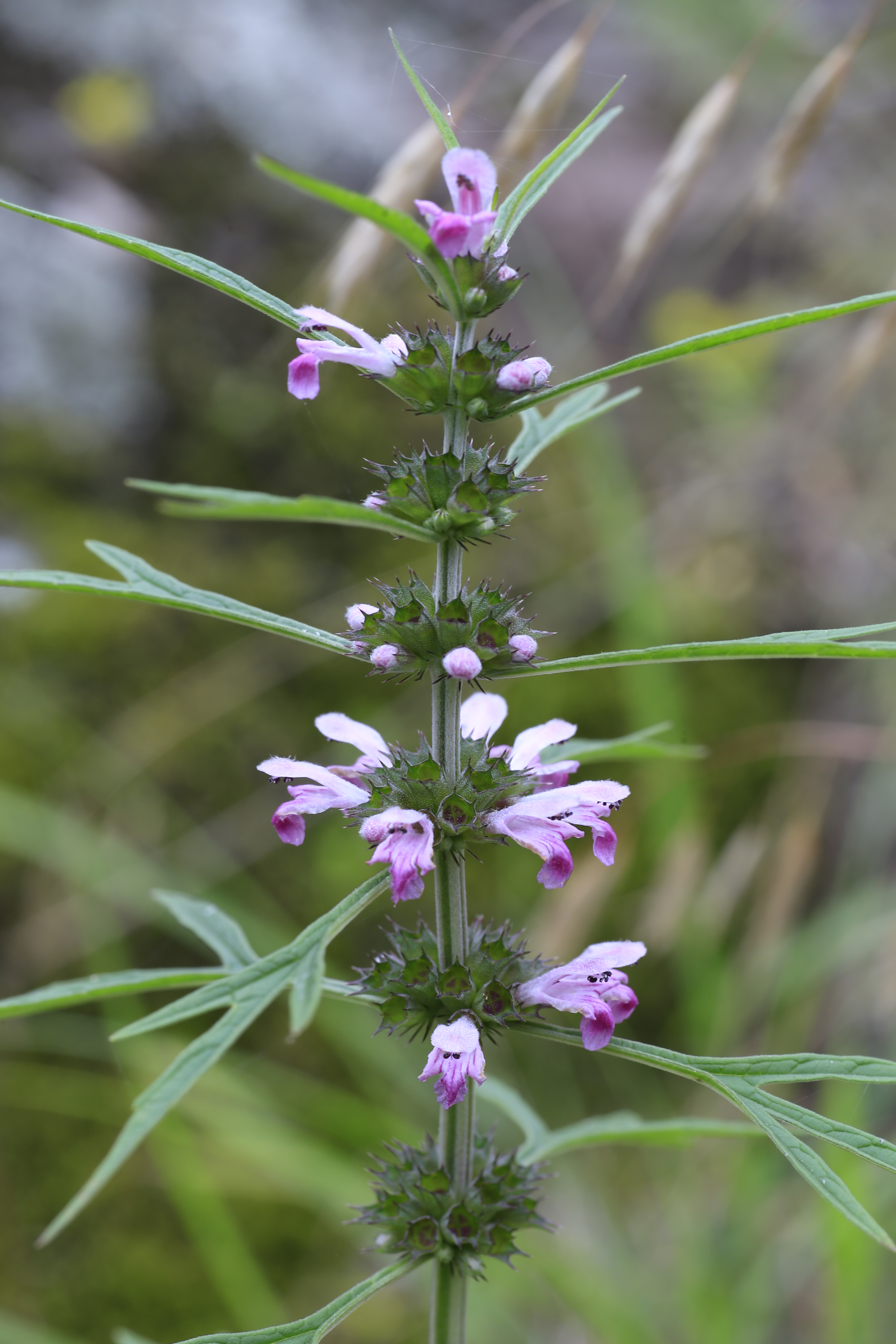 益母草（学名：Leonurus japonicus）